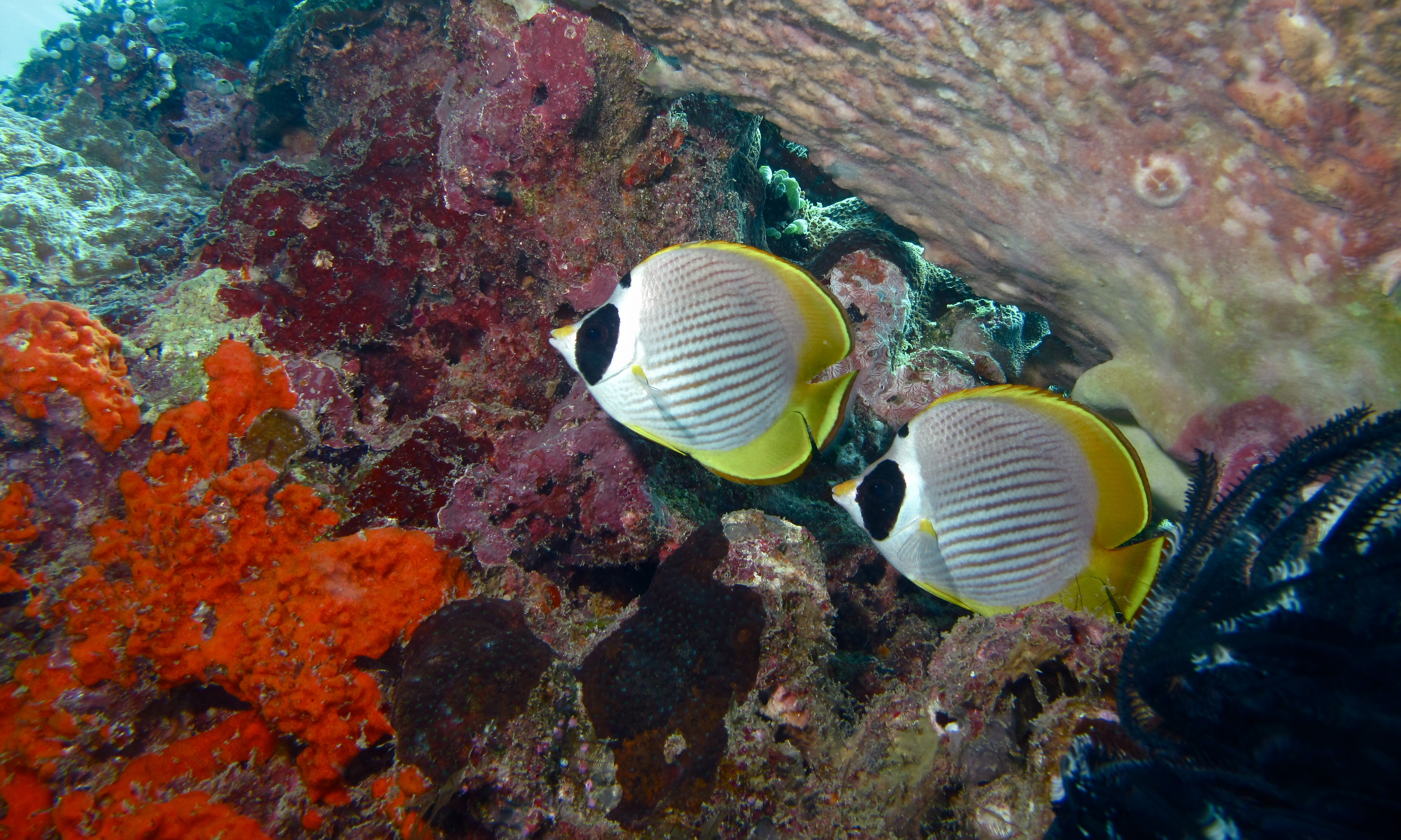 Hanging Gardens, Pulau Sipadan, Sabah, MALAYSIA